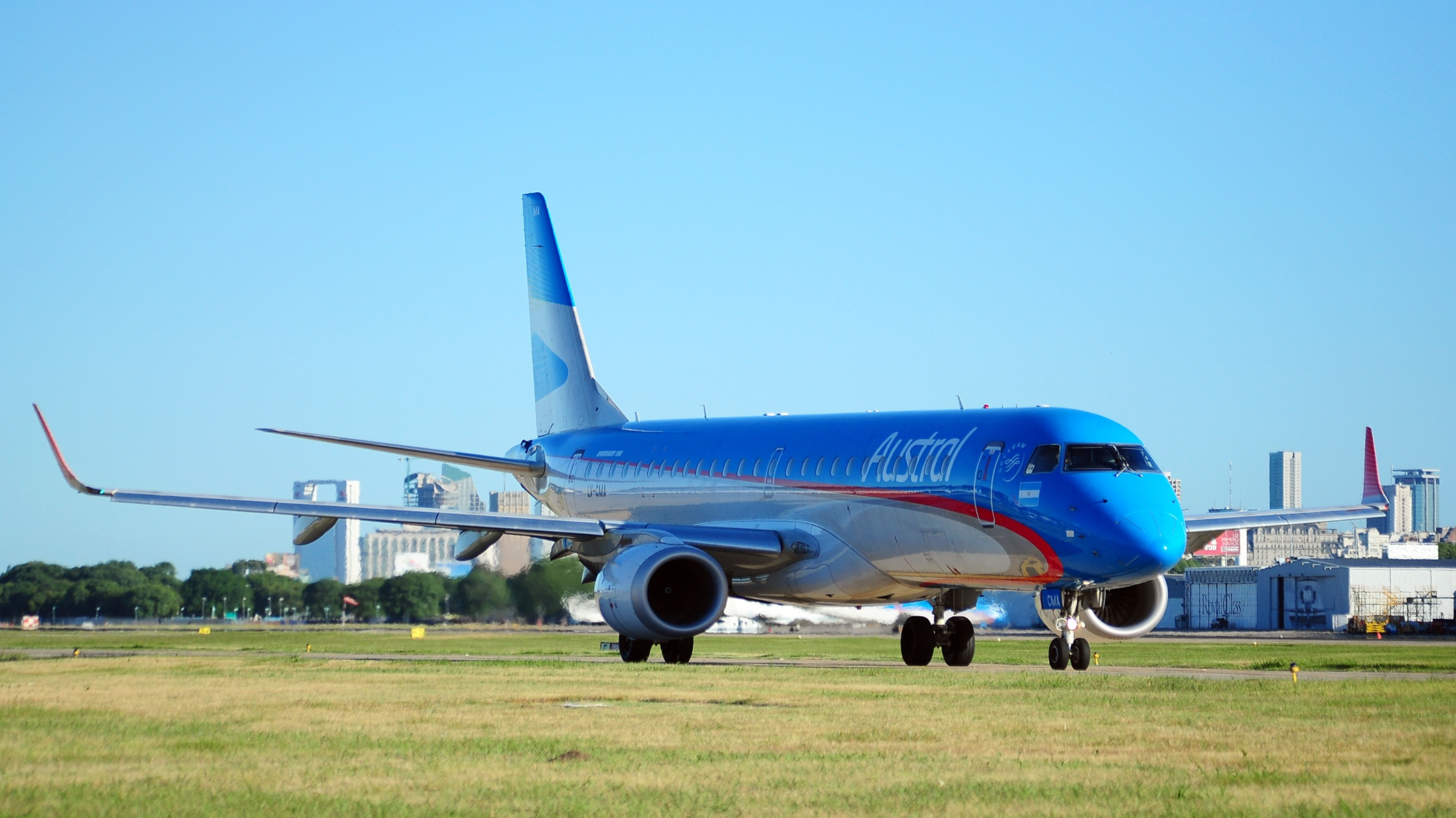 Embraer 190 (LV-CMA) - Austral Lineas Aereas - Aeroparque Jorge Newbery, Buenos Aires, Argentina.